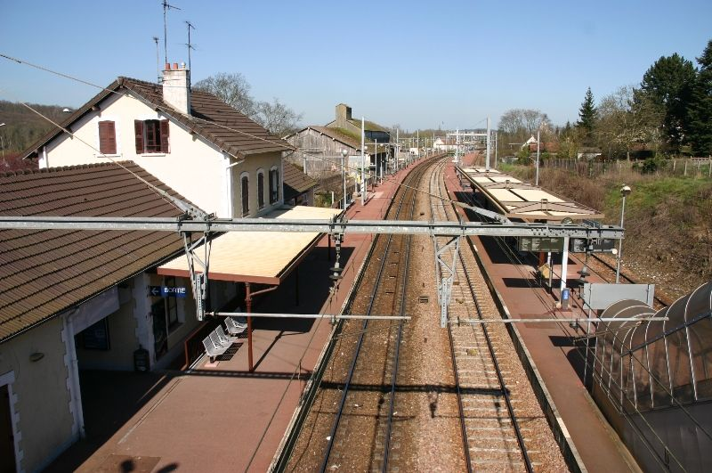 Gare de La Fertais-Alais. A gauche : la voie vers Ballancourt/Paris. A droite : la voie vers Boutigny-sur-Essonne/Malesherbes.